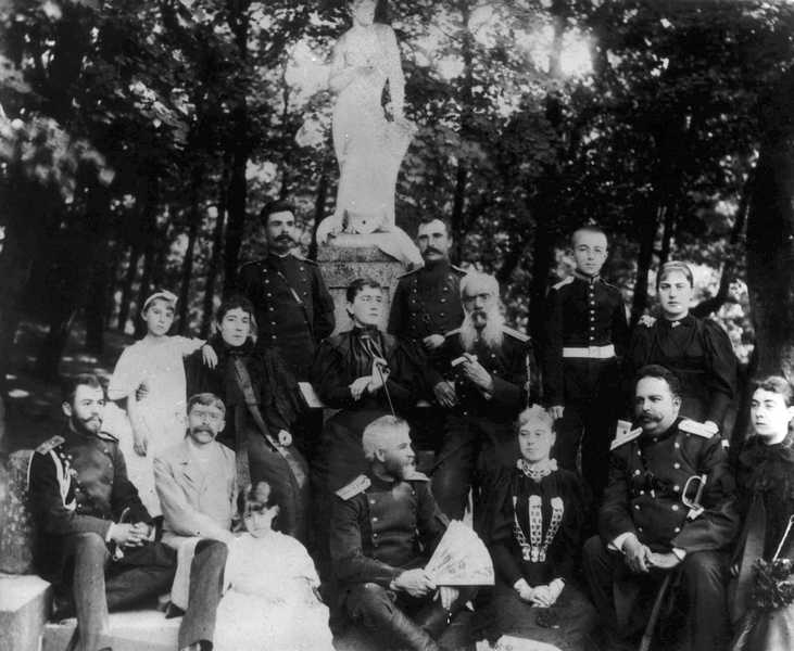 Сімейне фото родини Потоцьких